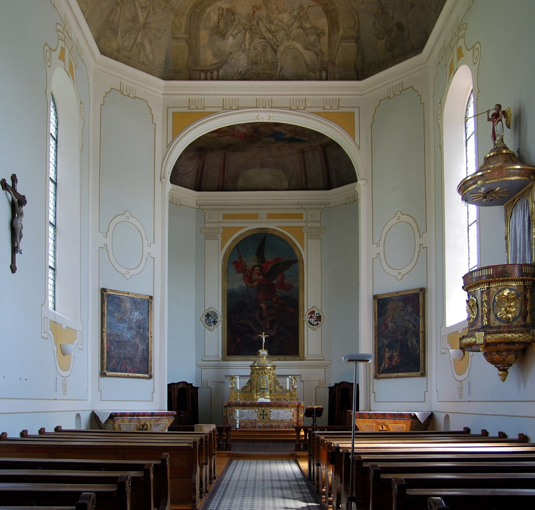 Schloss Beuggen: das Innere der Schlosskirche